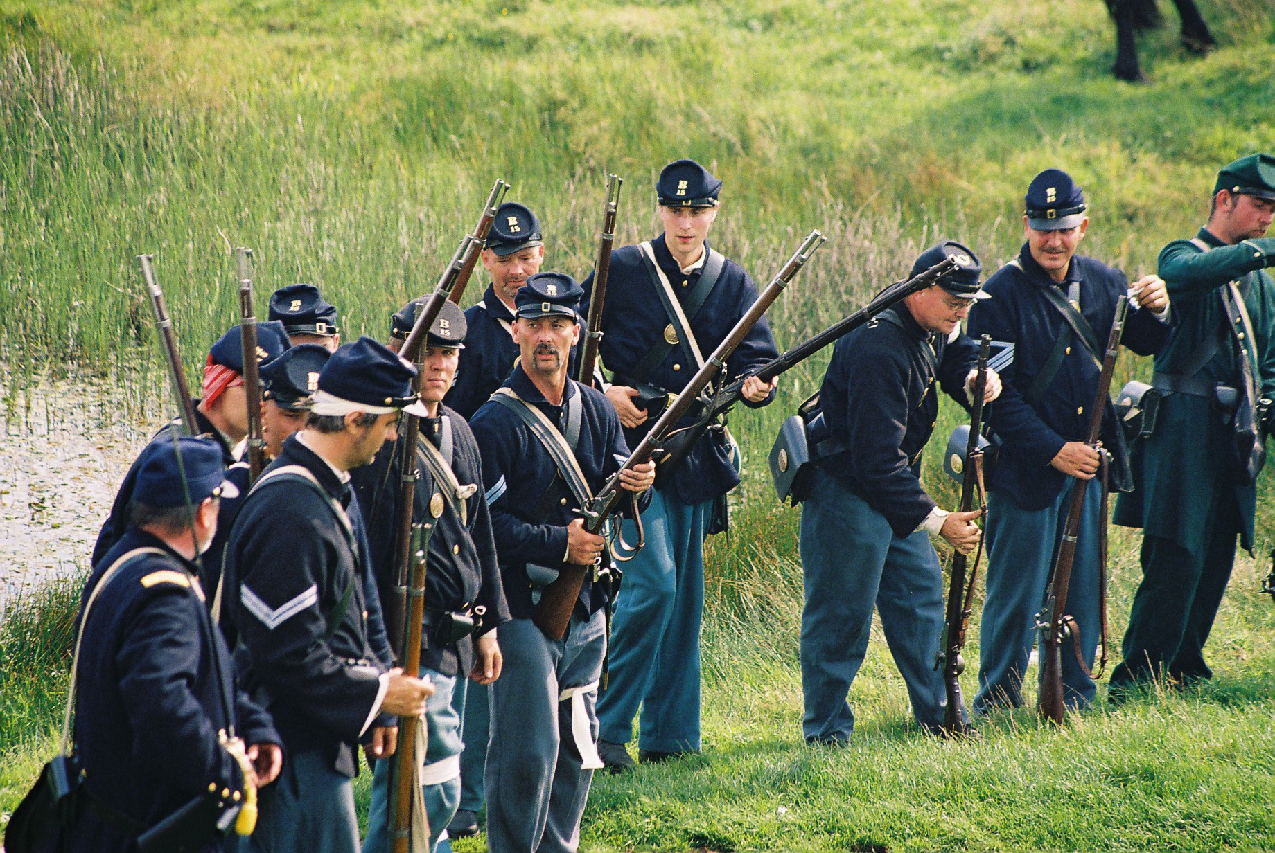 D. 26. august 2006 blev Slaget ved Bentonville, North Carolina 19-21. marts 1865 demonstreret i Lejre Forsøgscenter. Her var der bl.a. 'reenactere' fra 15th Wisconsin Infantry (se På billedet ses regulære infanterister og en enkelt snigskytte (grøn). Underofficererne havde himmelblå distinktioner i infanteriet.